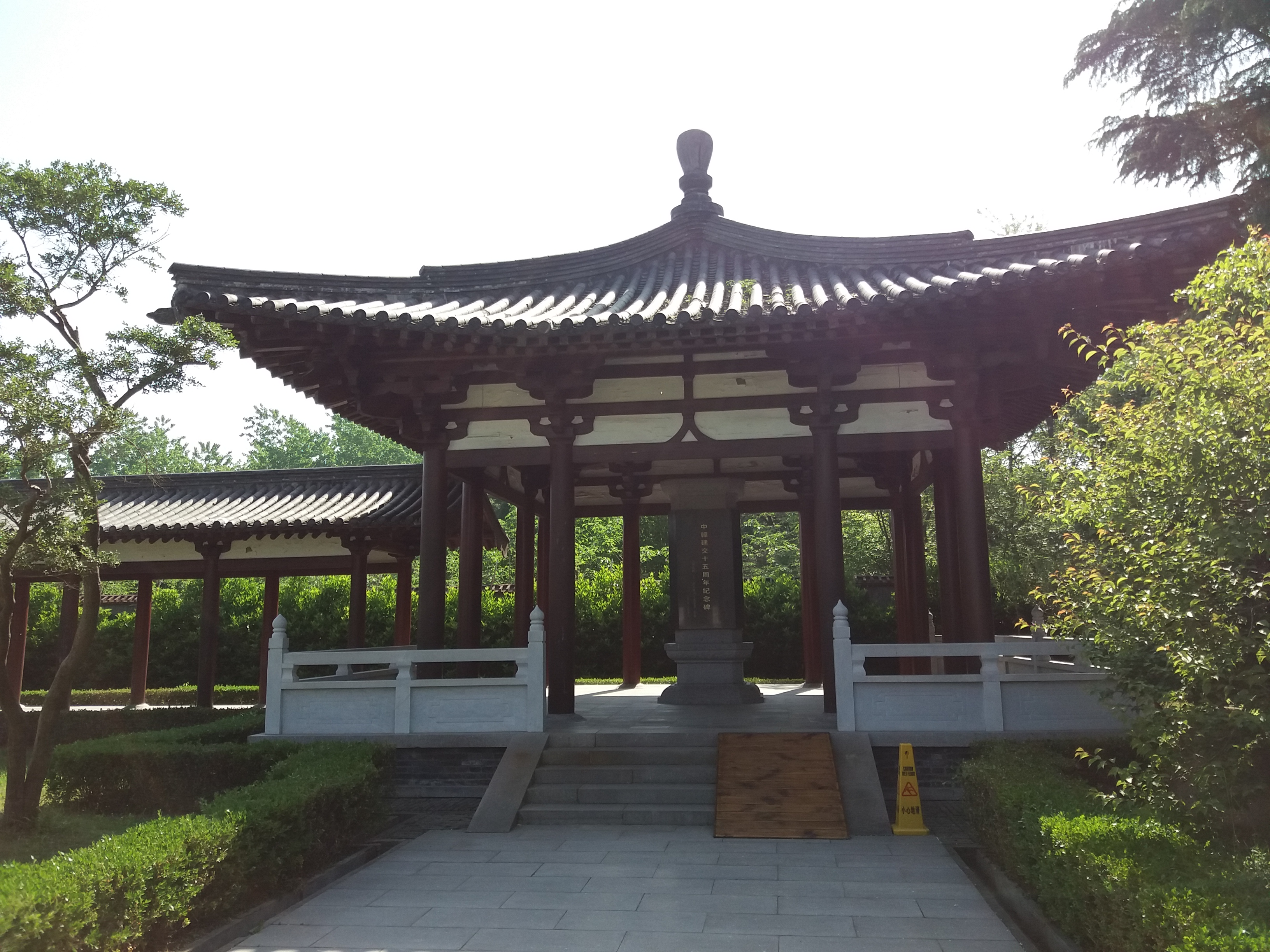 崔致远纪念馆园中的中韩友谊碑亭